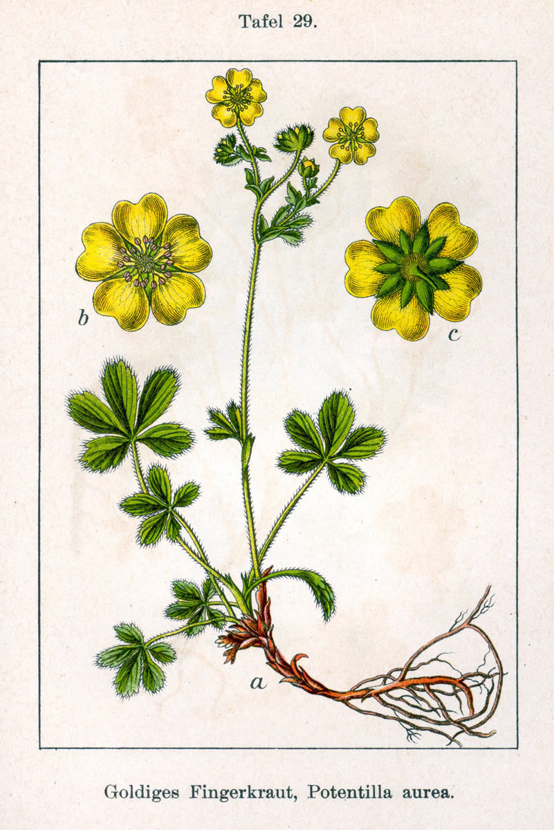 Potentilla aurea L. Original Description Goldiges Fingerkraut, Potentilla aurea